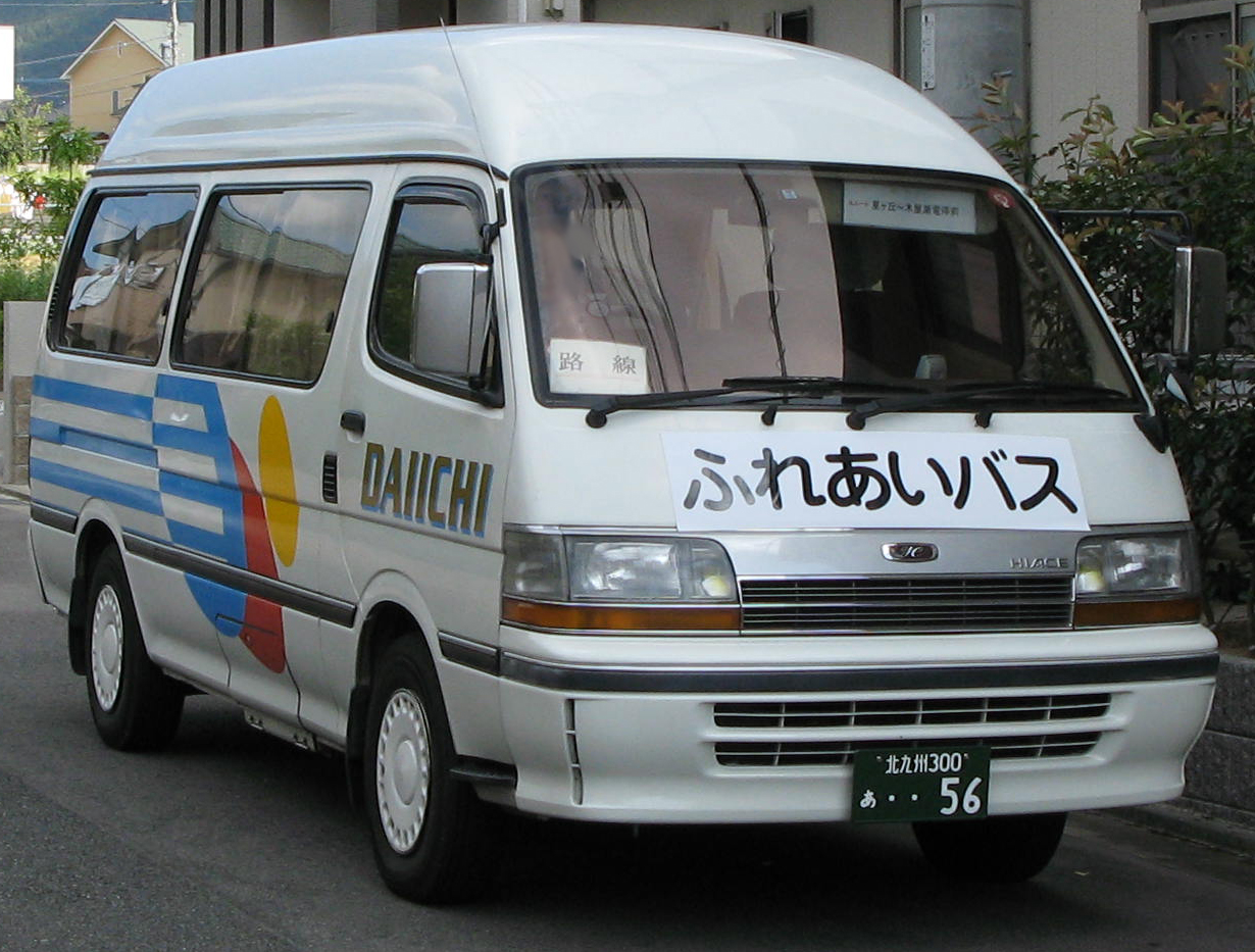 第一観光バス 北九州市おでかけ交通「ふれあいバス」の車両